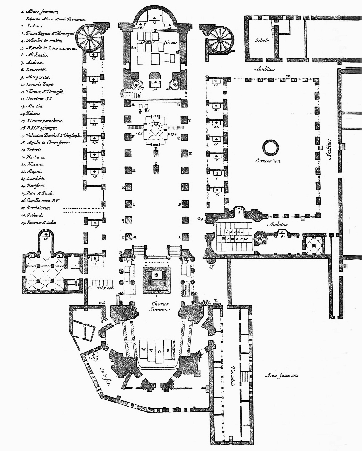 Der Mainzer Dom, Kupferstich Grundriss aus Gudenus, Codex diplomaticus 1747 Bd. 2; entnommen: Anton Philipp Brück, Willigis und sein Dom, Selbstverlag der Gesellschaft für mittelrheinische Kirchengeschichte, Mainz 1975